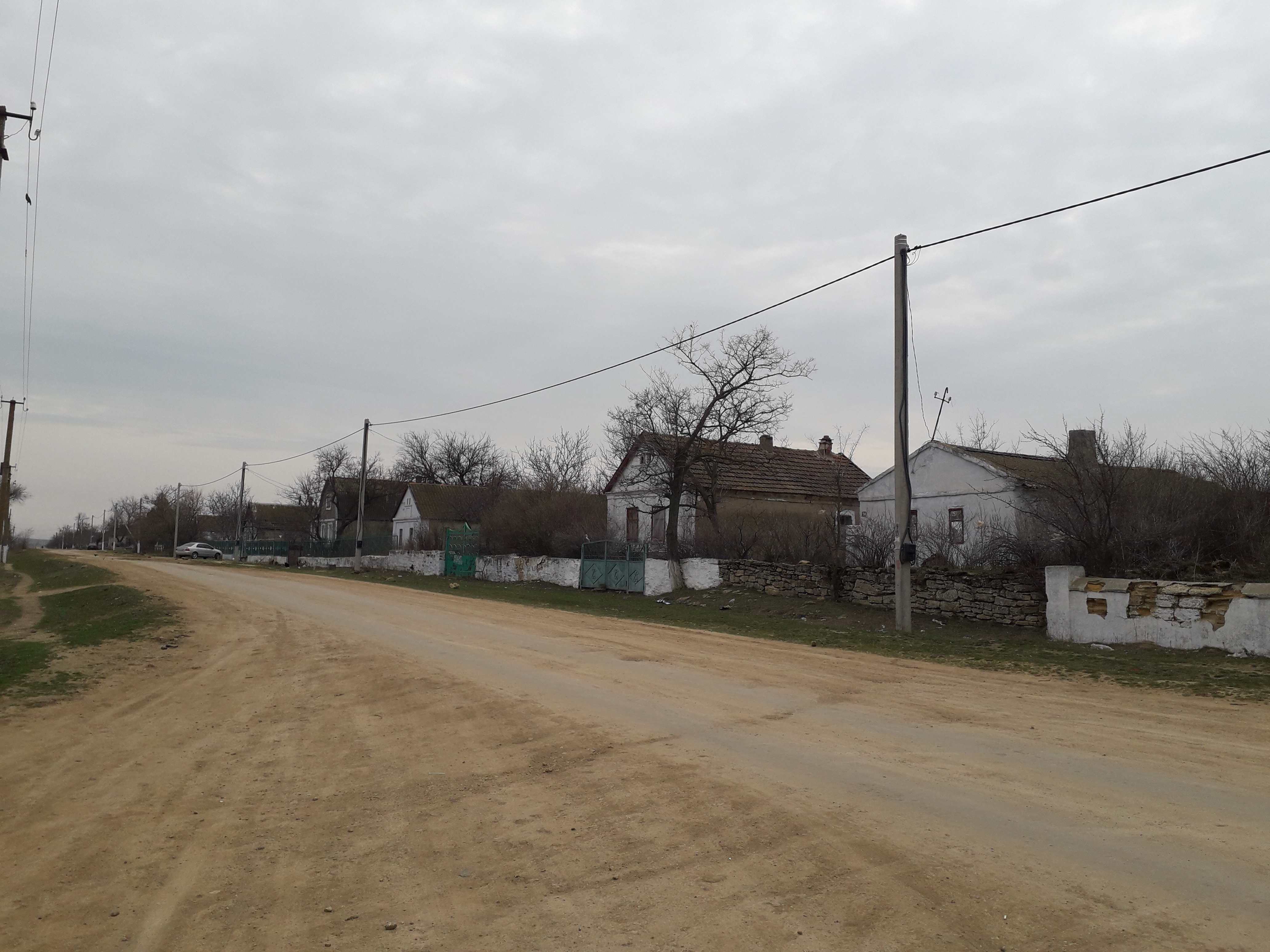 с. Кубанка, Красносільська сільська громада, Одеська область